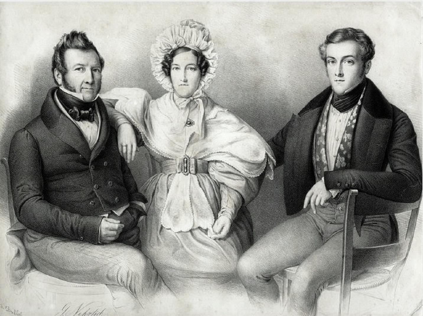 Gabriel Leonhard von Berckholtz (* 24.8.1781 Riga, † 1.8.1863 Ortenberg), Kaufmann, mit Ehefrau Barbara geb. Schröder (* 20. März 1785 in Riga; † 23. Februar 1859 Ortenberg) und Sohn Jacob (1815–1887)